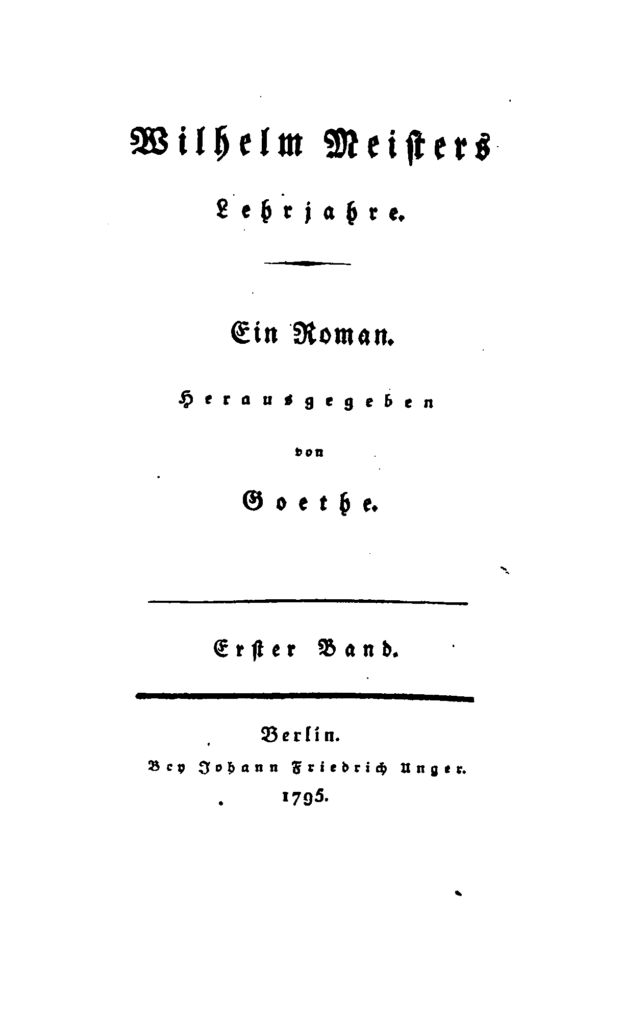 Titelblatt: Wilhelm Meisters Lehrjahre.